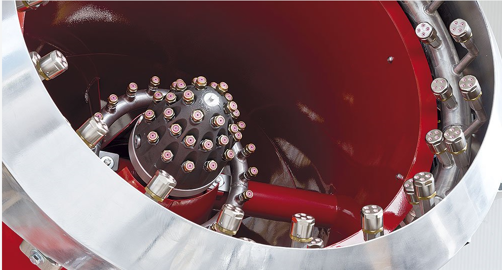 Im Bild sieht man eine detaillierte Ansicht der Düsen einer Brandbekämpfungsturbine.